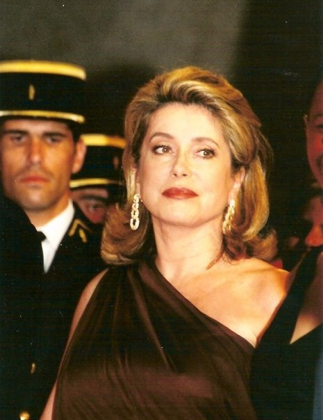 Catherine Deneuve au festival de Cannes